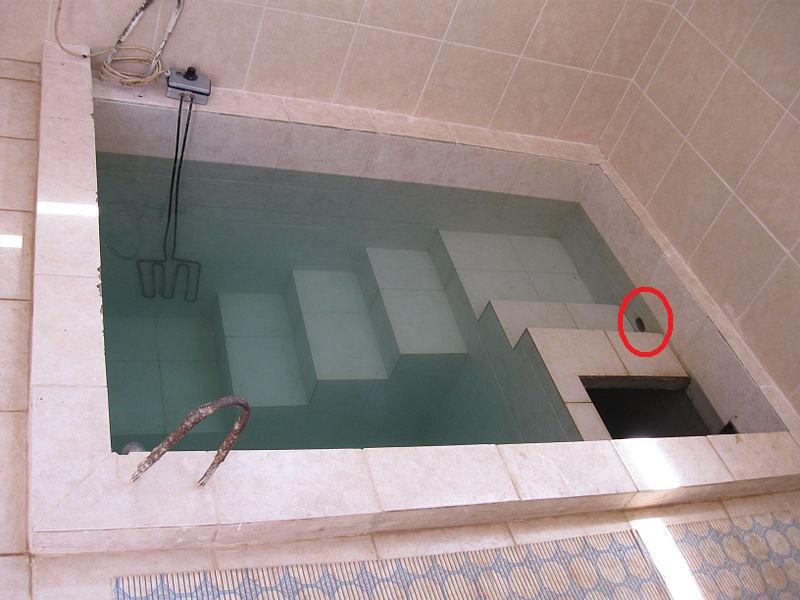 בור טבילה עם הדגשה על חור ההשקה